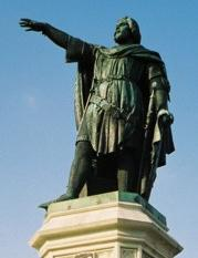 eigen Foto januari 1999